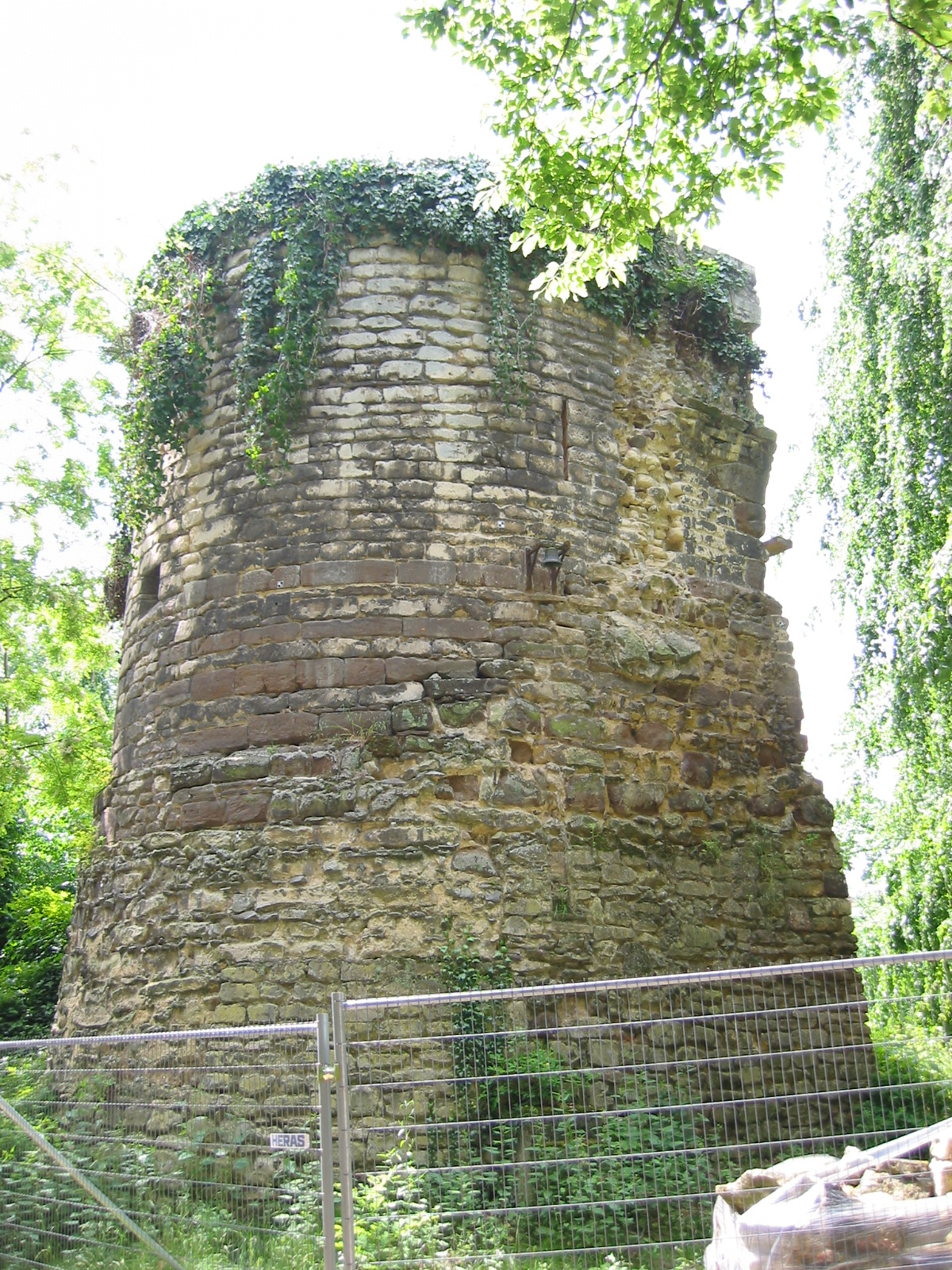 Een restant van de eerste stenen omwalling van Leuven, gebouwd in de twaalfde eeuw, in het Sint-Donatuspark(Gemaakt in juni 2006)